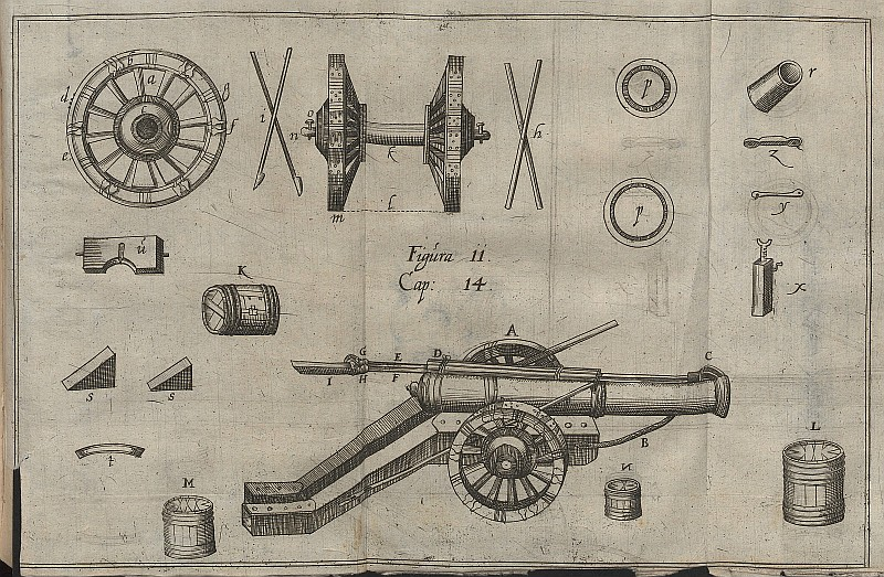 Original image description from the Deutsche Fotothek Kriegskunst & Kanone